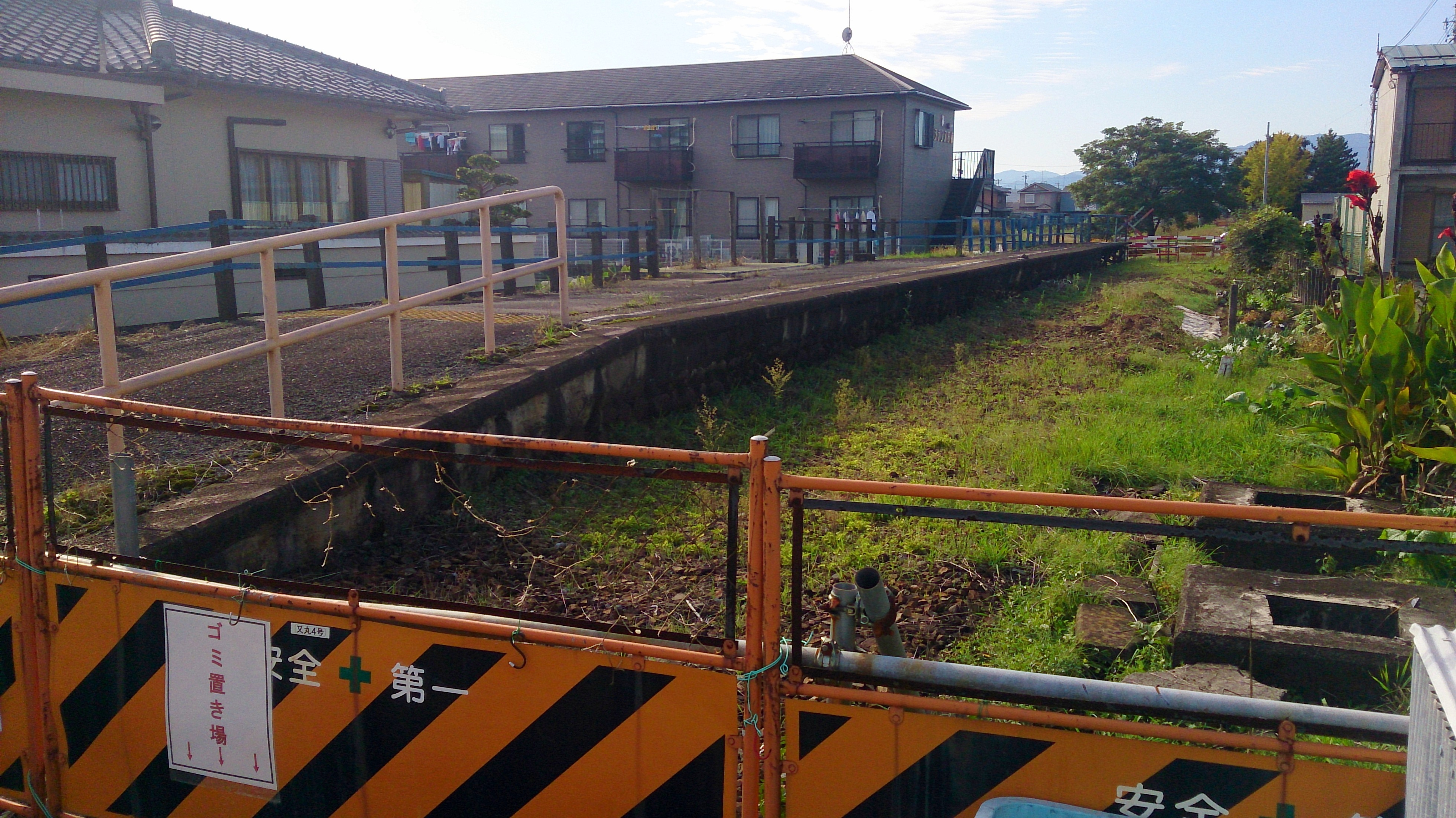 旧名鉄揖斐線の廃線ホーム。この東側道路の歩道工事が撮影時点直前で済んだので、東側で撮影。